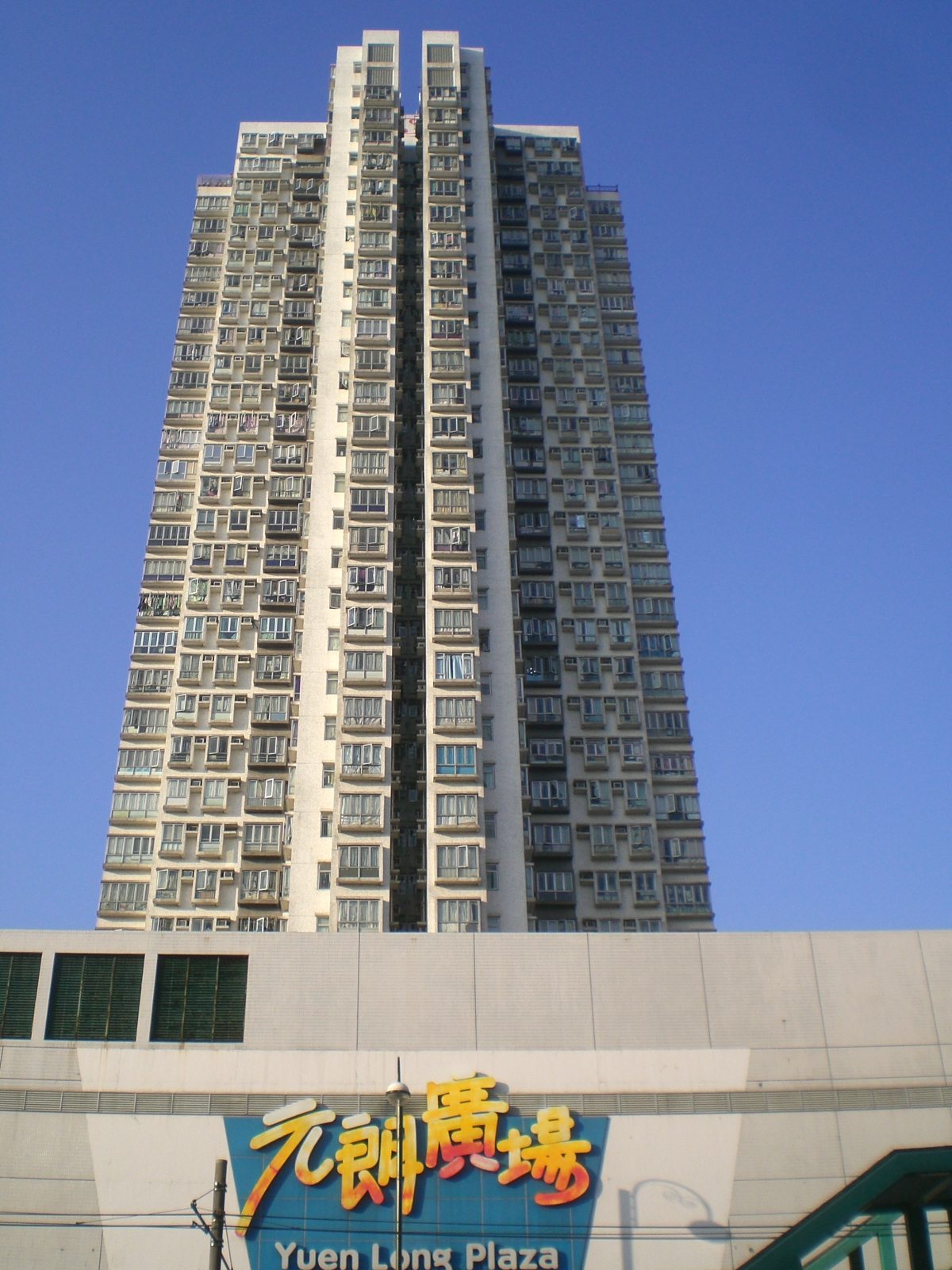 青山公路元朗段 元朗廣場單幢樓住宅